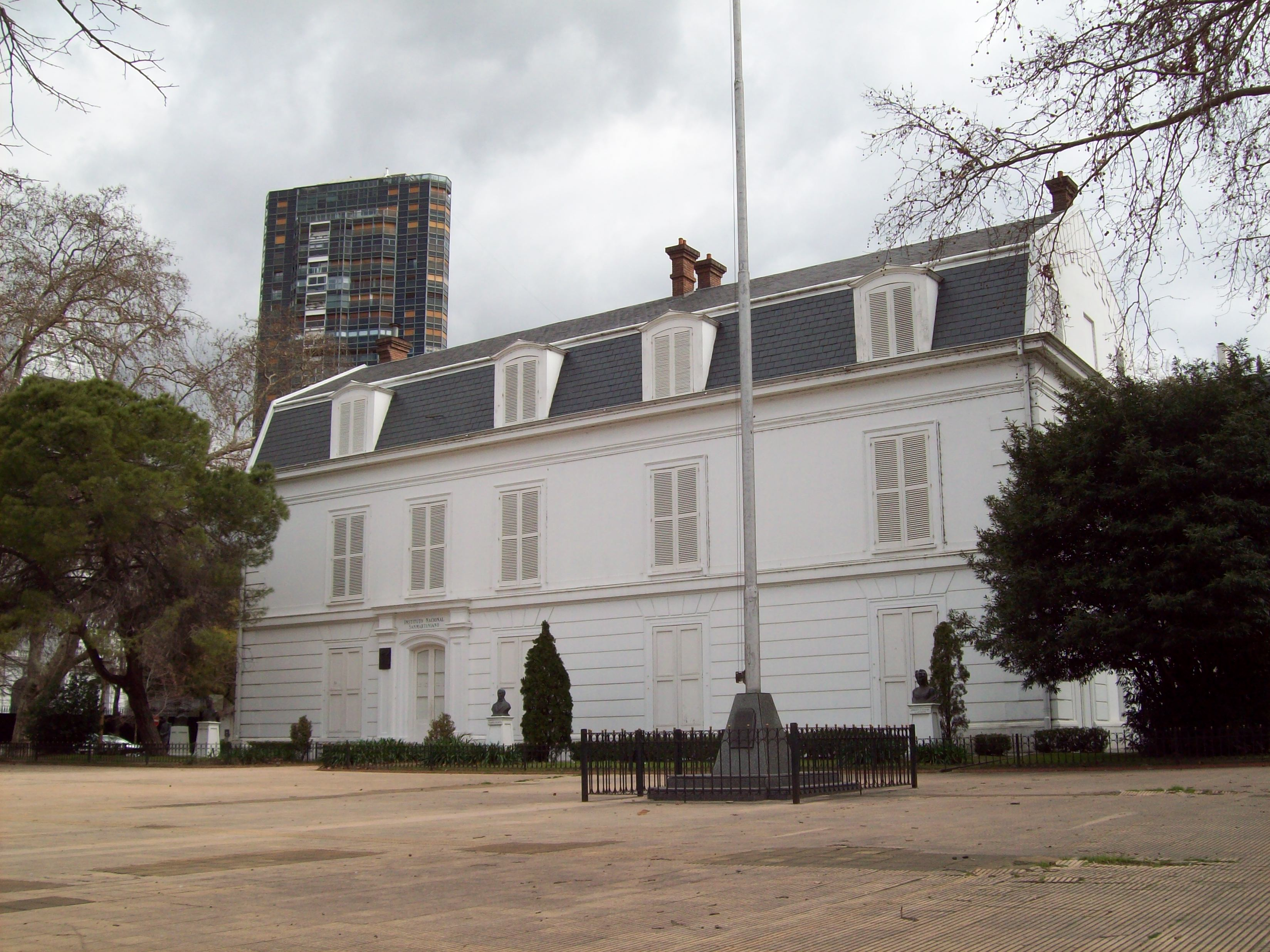 Instituto Nacional Sanmartiniano en Buenos aires, sobre la calle Mariscal Ramón Castilla. Se trata de un edificio de tres plantas ubicado en el barrio de Palermo, ciudad de Buenos Aires, que es una réplica de la Casa Gran Bourg en que San Martín vivió y murió.